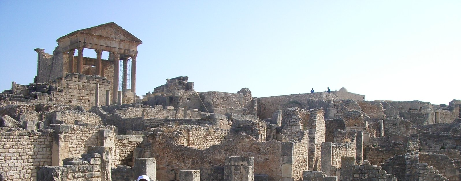 Termes de Caracal·la i Capitoli